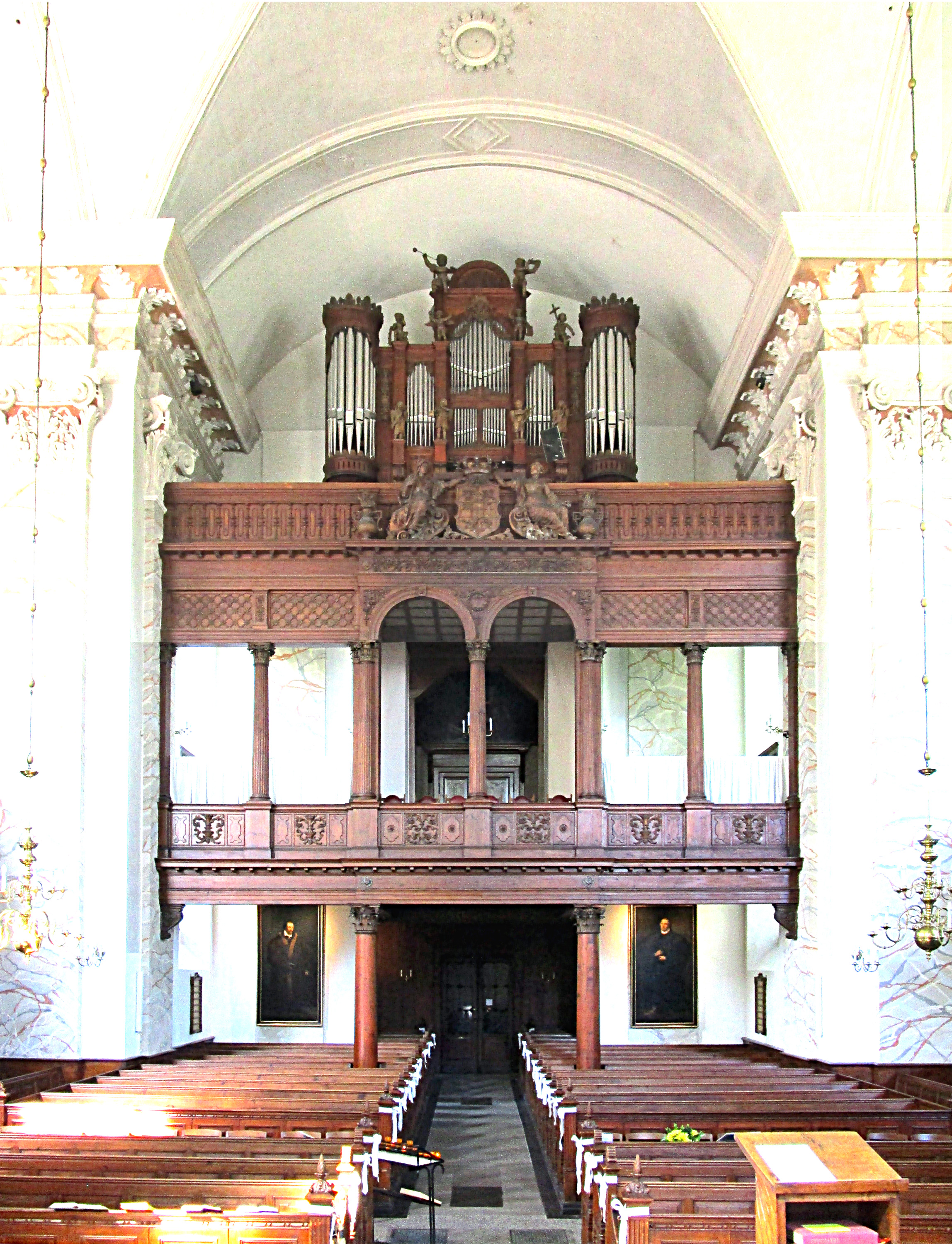 Blick zur Fürstenloge und der darüber befindlichen Orgel der Kirche St. Nikolai (Schelfkirche) Schwerin.